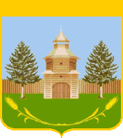 Герб Борского района Самарской области